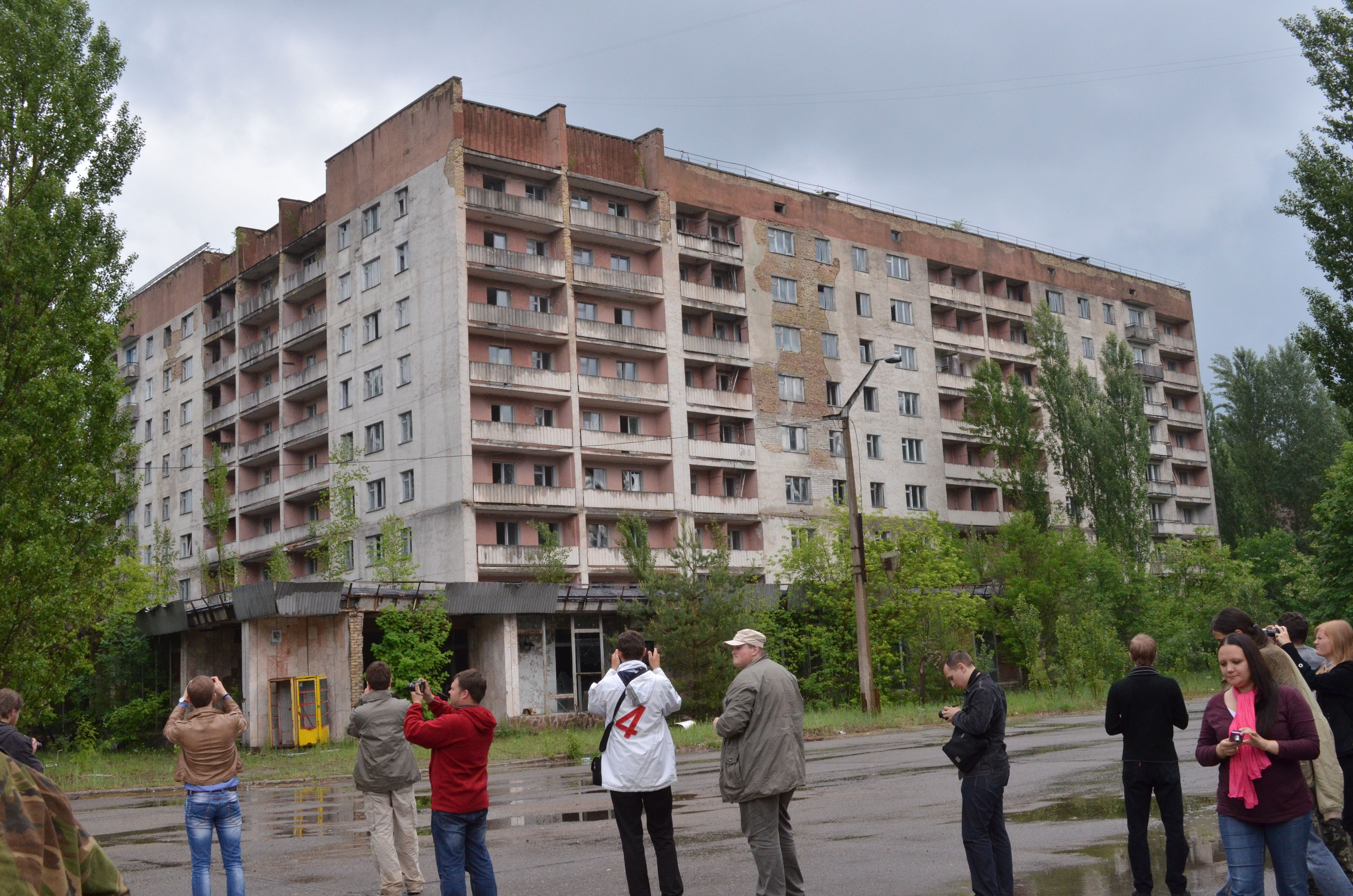 Вікіекспедиція до Чорнобиля 2013